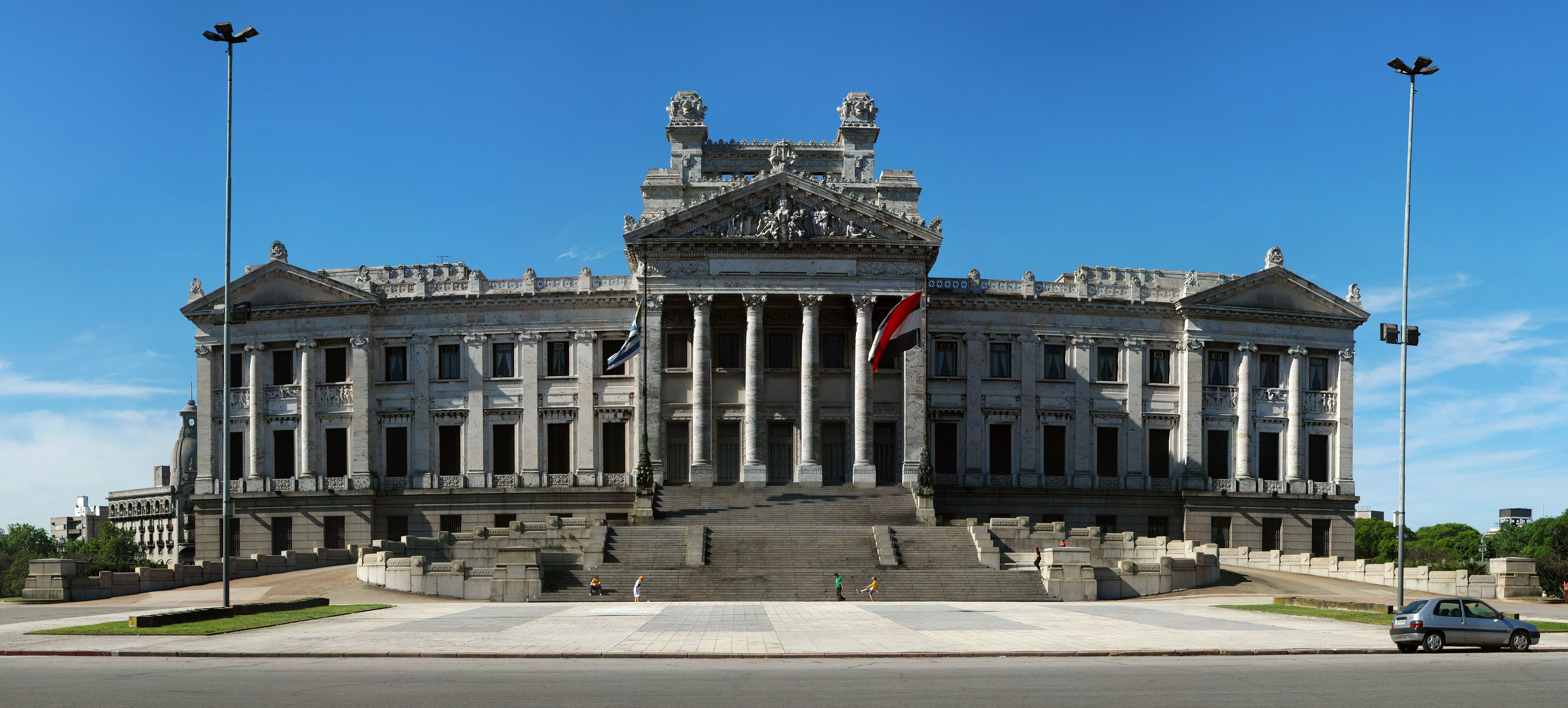 Palacio Legislativo, Montevideo, Uruguay